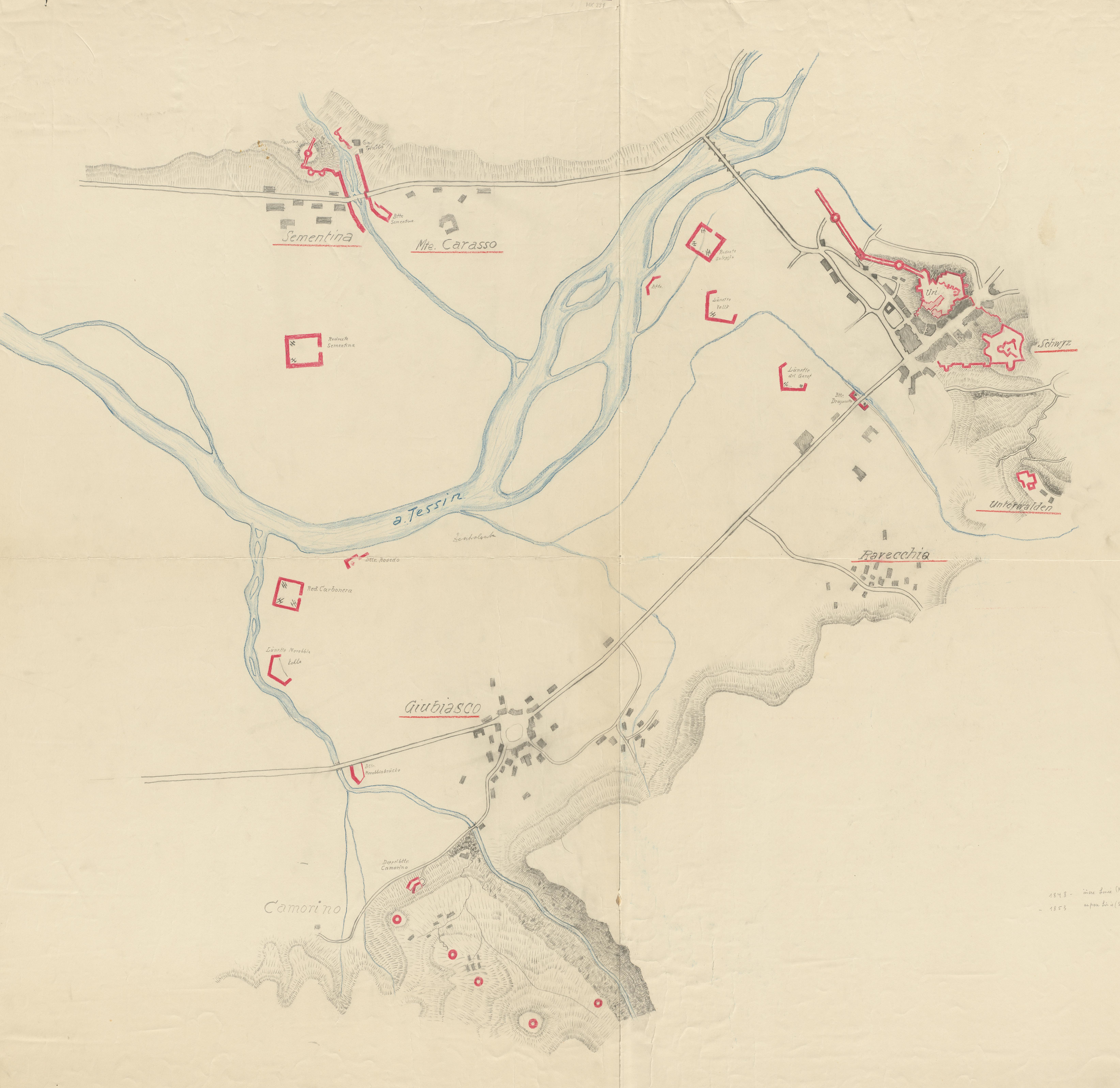 Befestigungen in Sementina, Giubiasco und Bellinzona um 1900, Tessin, Schweiz